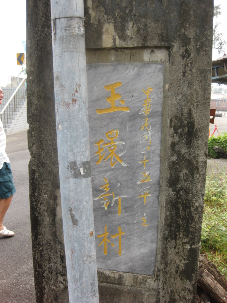 中文（台灣）: 玉環新村門口的石柱，上書「玉環新村」四字。